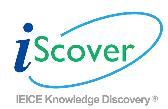 I-Scover